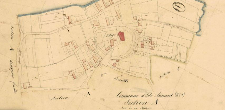 Document reconstituant la section A du plan cadastral napoléonien d'Isle-Aumont en 1829.